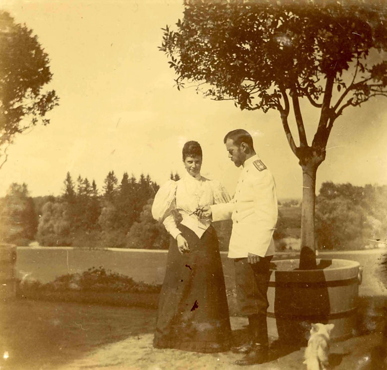 Императрица Мария Федоровна с сыном императором Николаем II. Петергоф. 1896 Фотограф неизвестен.